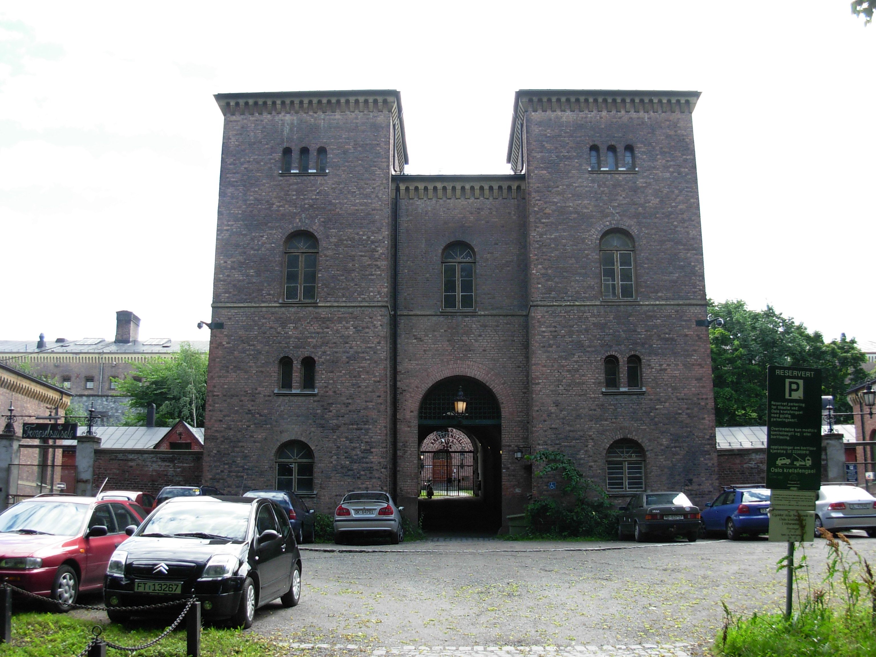 Oslo fengsel (prison), inngang (entrance)